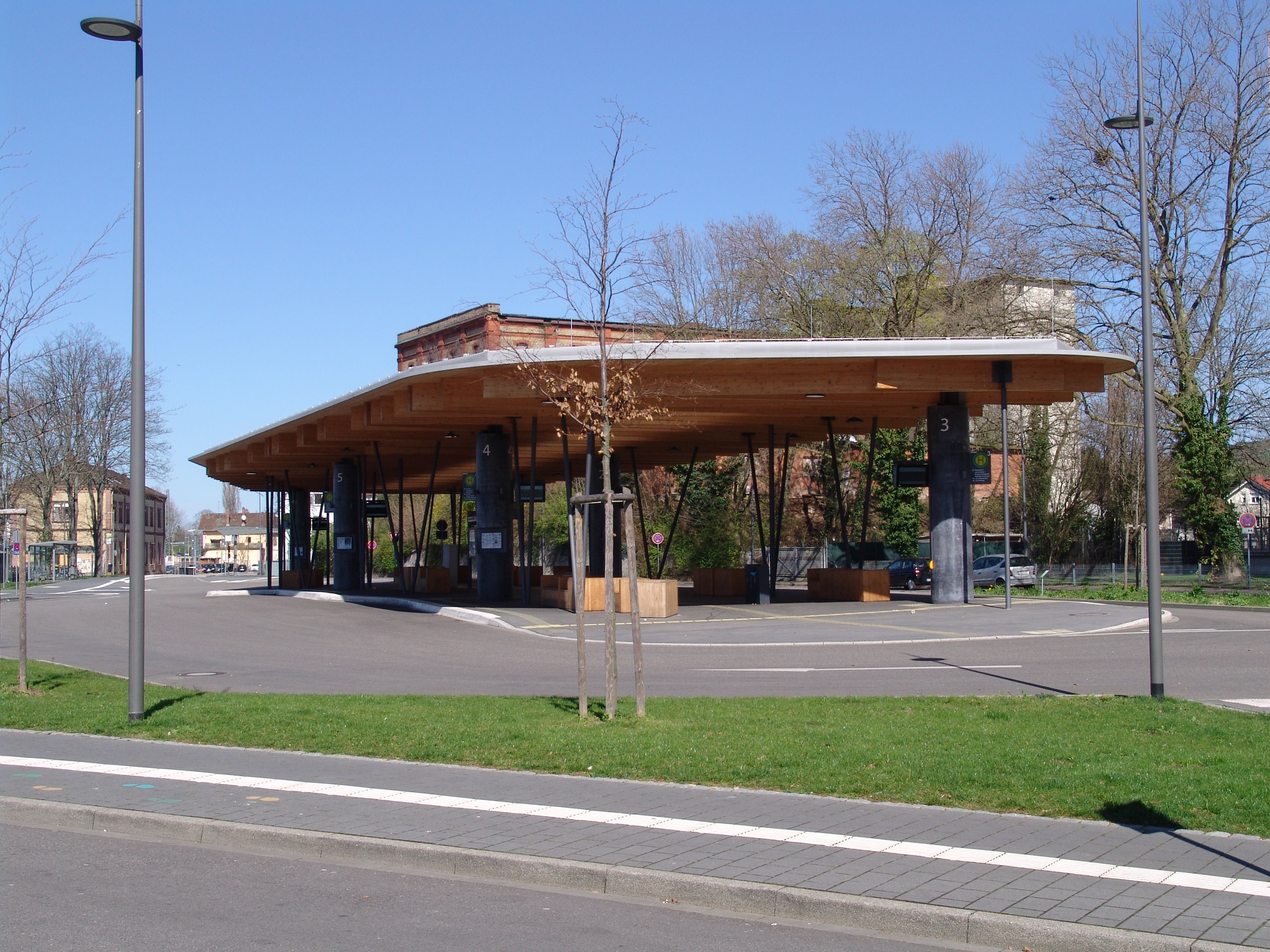 Das Bild zeigte den Zentral Busbahnhof Lahr an Bahnhof (von Süden)